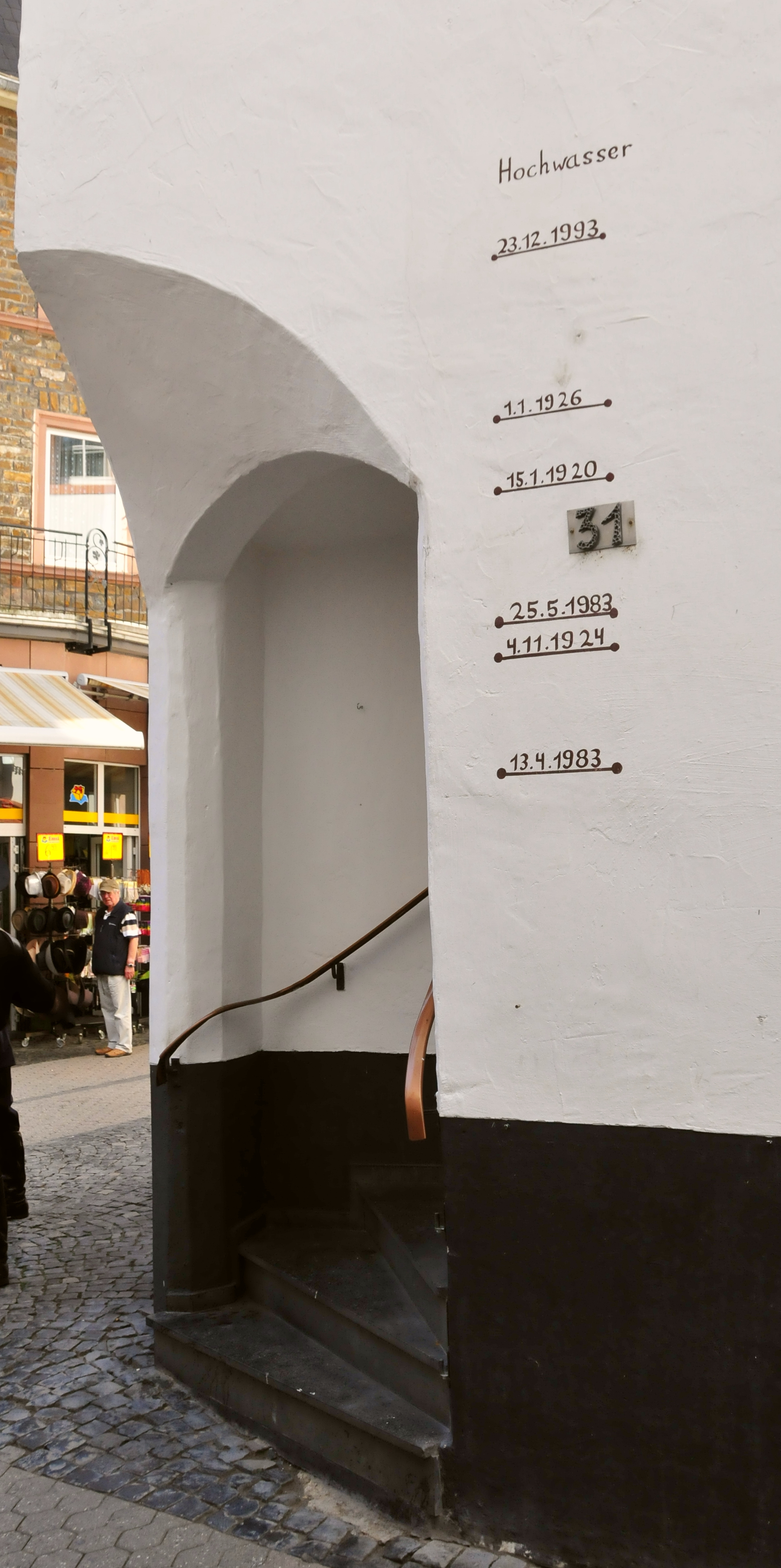 Cochem, Hochwassermarken in der Innenstadt